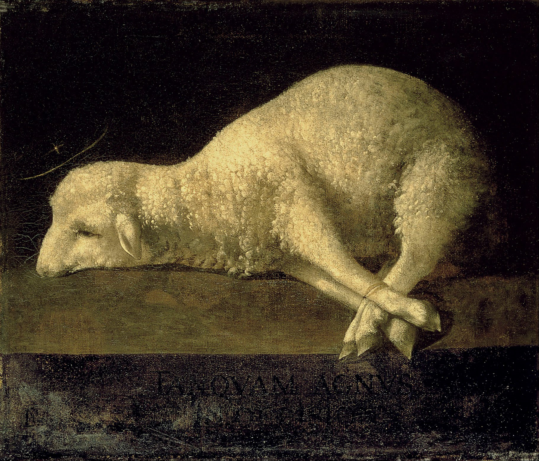 La obra representa a Jesucristo como el Cordero de Dios.